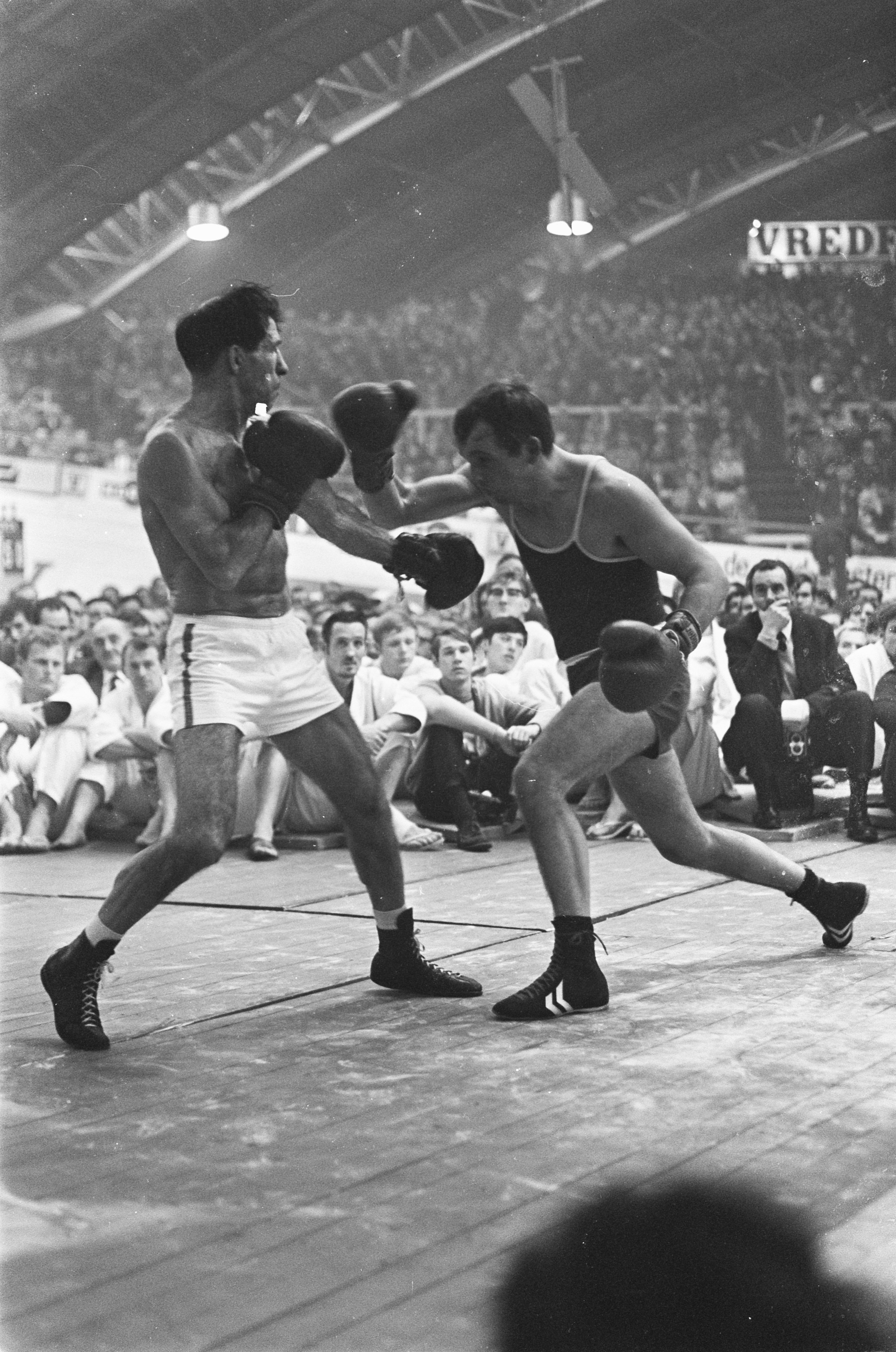 Collectie / Archief : Fotocollectie Anefo Reportage / Serie : [ onbekend ] Beschrijving : Zesdaagse Amsterdam, Bep van Klaveren tijdens de bokswedstrijd Datum : 11 december 1967 Locatie : Amsterdam, Noord-Holland Trefwoorden : boksen, wedstrijden Persoonsnaam : Bep van Klaveren, Bokswedstrijden Fotograaf : Nijs, Jac. de / Anefo Auteursrechthebbende : Nationaal Archief Materiaalsoort : Negatief (zwart/wit) Nummer archiefinventaris : bekijk toegang 2.24.01.05 Bestanddeelnummer : 920-9195